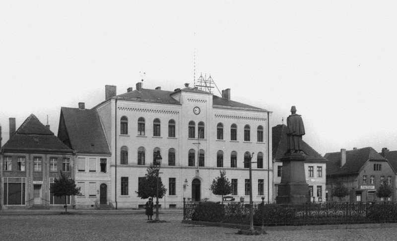 Ratusz i pomnik cesarza Wilhelma I w Gryficach (przed 1945 Greifenberg)